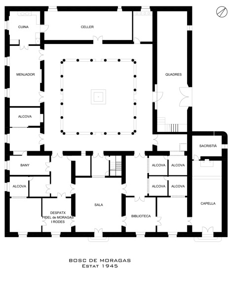 Planta baixa tal com era el 1940 després de la remodelación